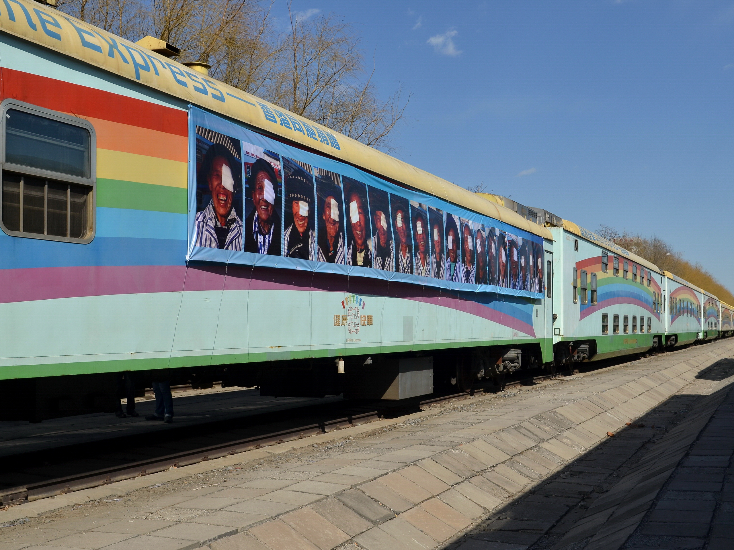 2002年7月正式投入服务的第三列健康快车